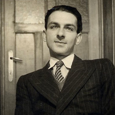 Youra Livchitz, héros belge de la seconde guerre mondiale photographié en 1943. Il est connu pour avoir attaqué le XXe convoi de déportation des juifs de Belgique.